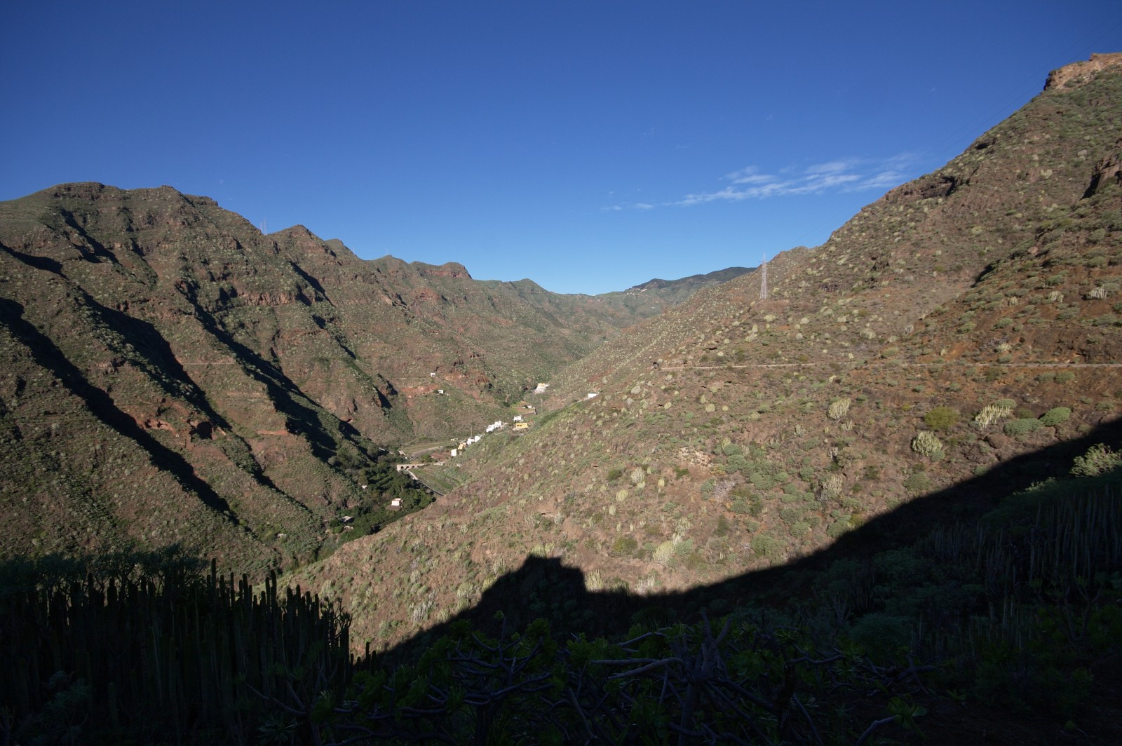 Vista de Tahodio